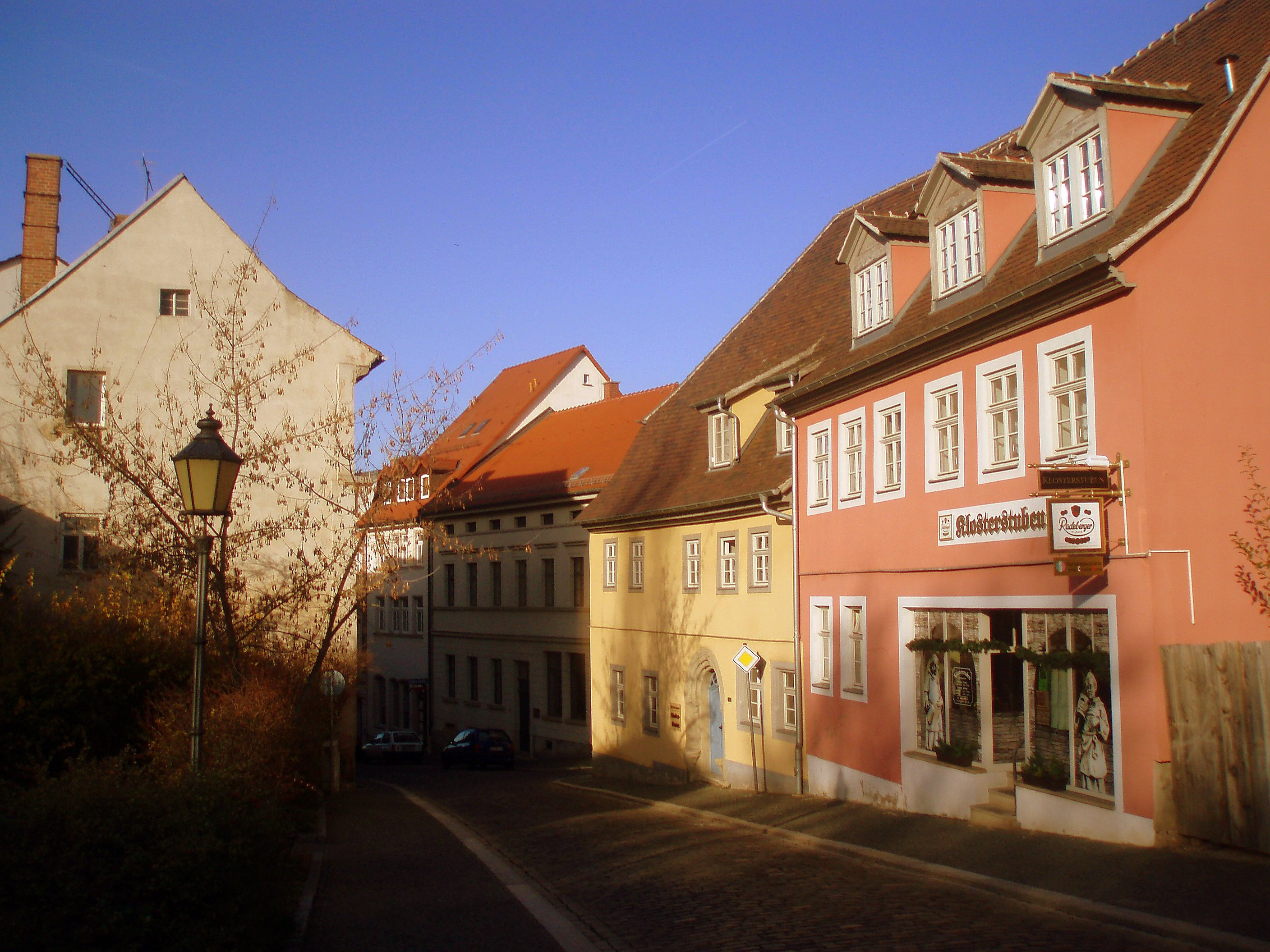 Altstadt Zeitz